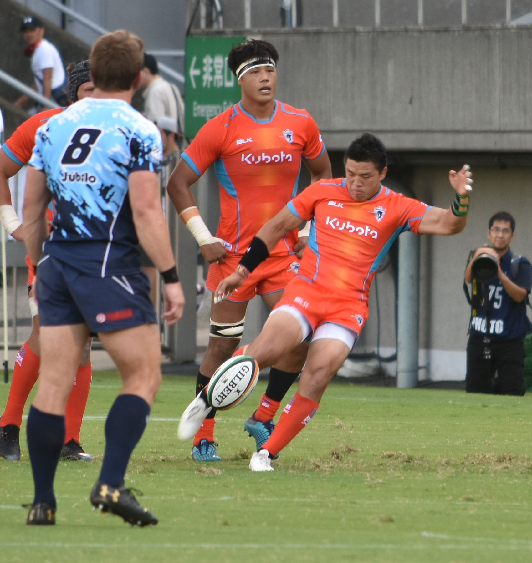 立川 理道